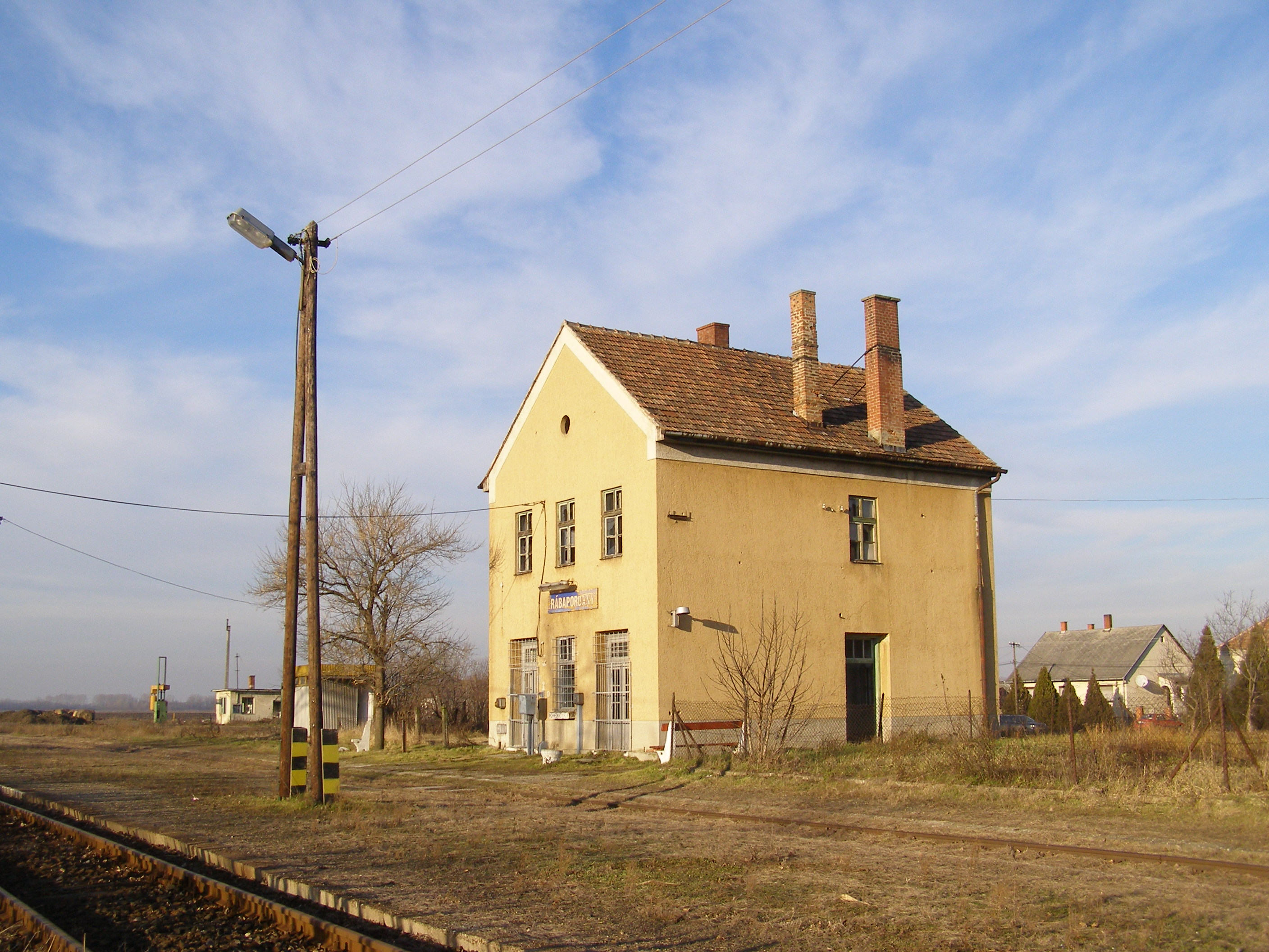 Rábapordány, vasútállomás